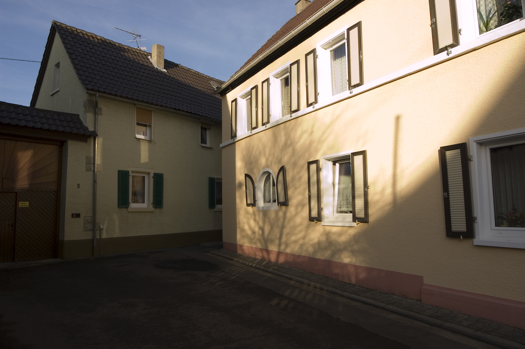 Gehöfte in Uelversheim